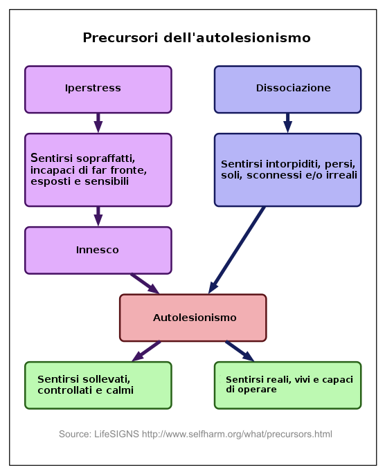 Autolesionismo